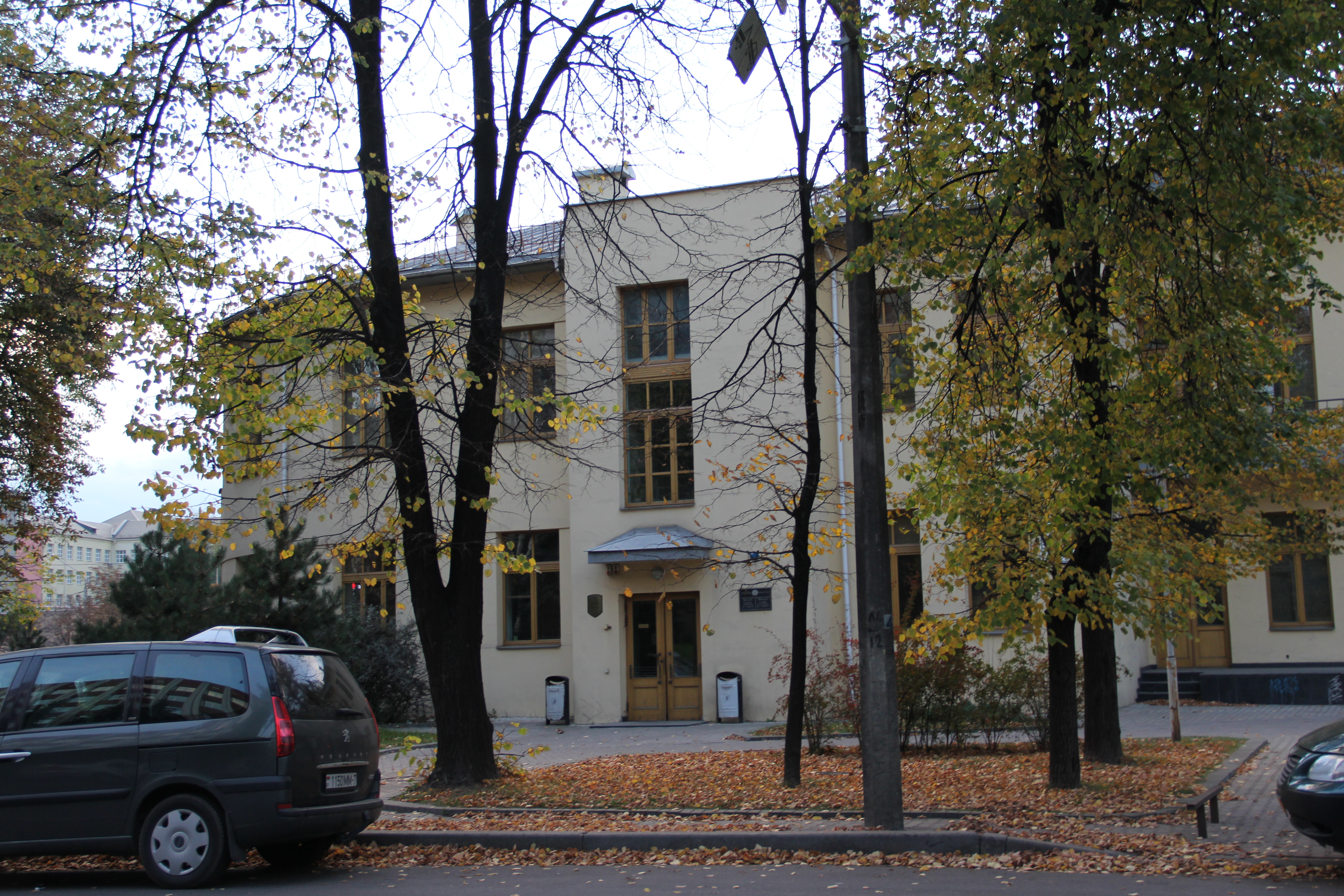 Беларуская (тарашкевіца): Будынак былой паліклінікі. г. Менск This is a photo of Belarusian heritage monument. Reference number: 712Г000145 ( WLM)